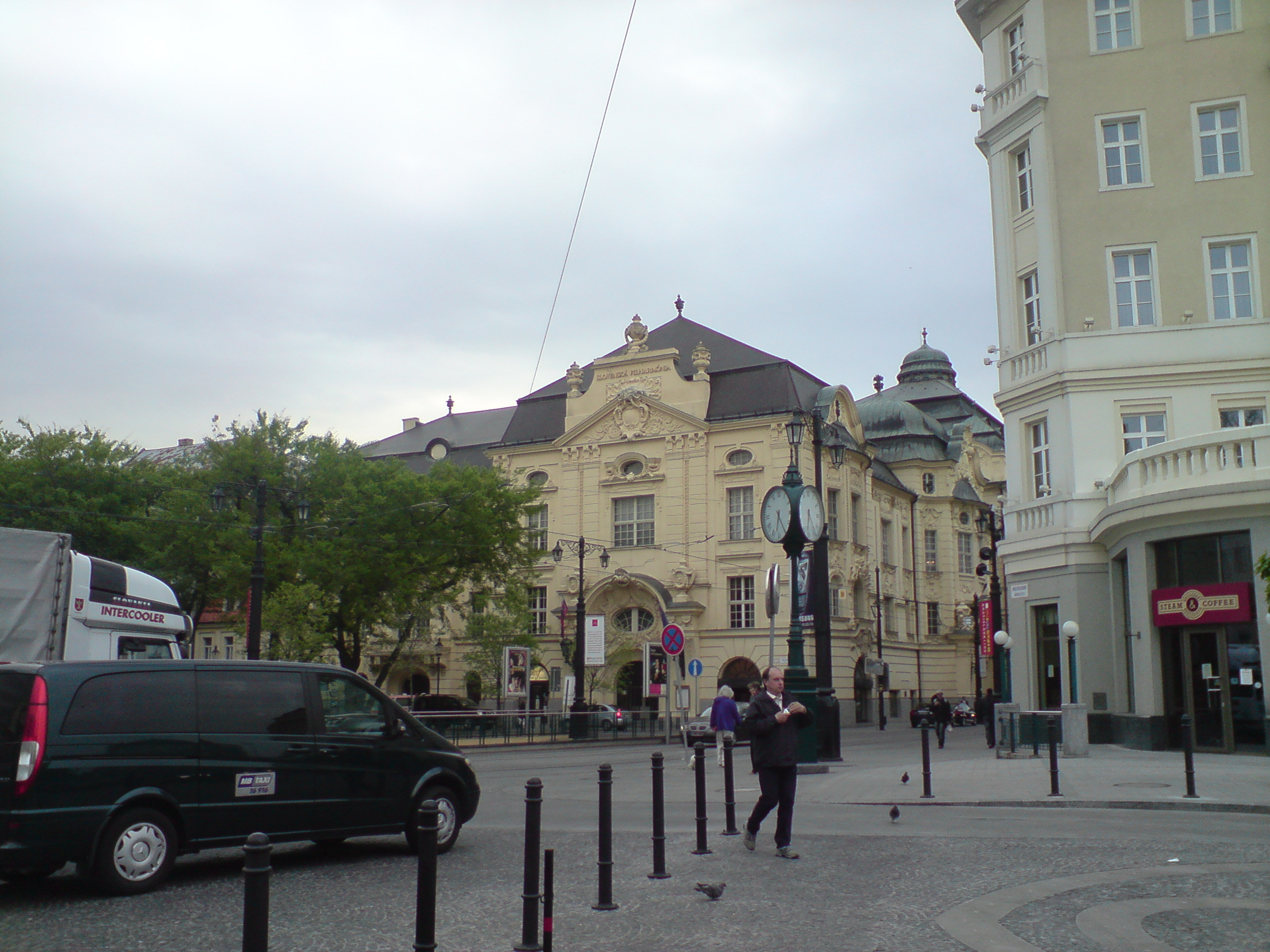 Reduta, Námestie Eugena Suchoňa, Bratislava